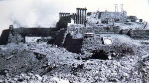 המוצב הישראלי במלחמת יום כיפור